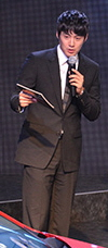 폭스바겐코리아 폴로 1.6 TDI R-Line 발표회